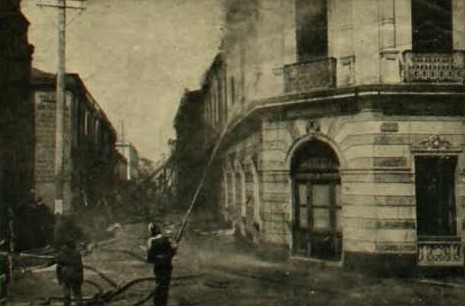 Bomberos en el incendio de la legación alemana, Santiago, Chile.